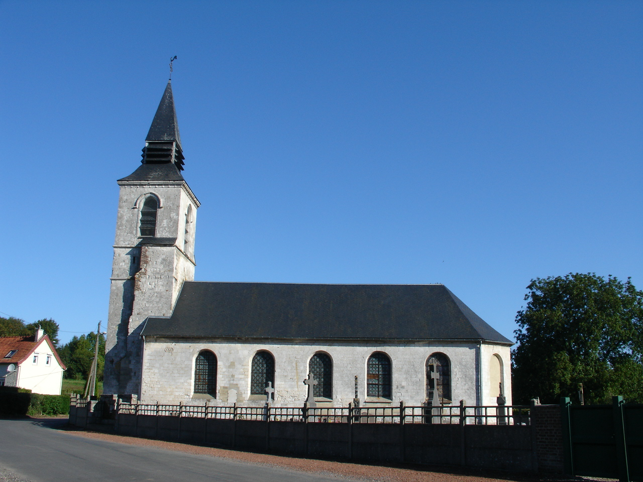 Église de Ramecourt